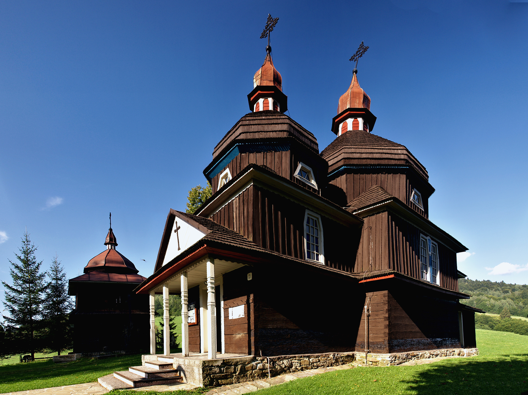 Nižný Komárnik (District de Svidnik - Prešovský kraj) - L'église catholique grecque Ruthène de la Protection de la Mère de Dieu